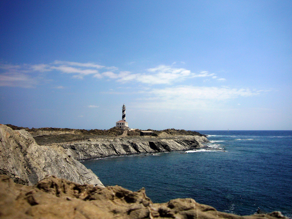 Faro del cabo de Faváritx, cerca de la playa de las tortugas, en la Isla de Menorca, en el parque natural de S´Albufera des Grau